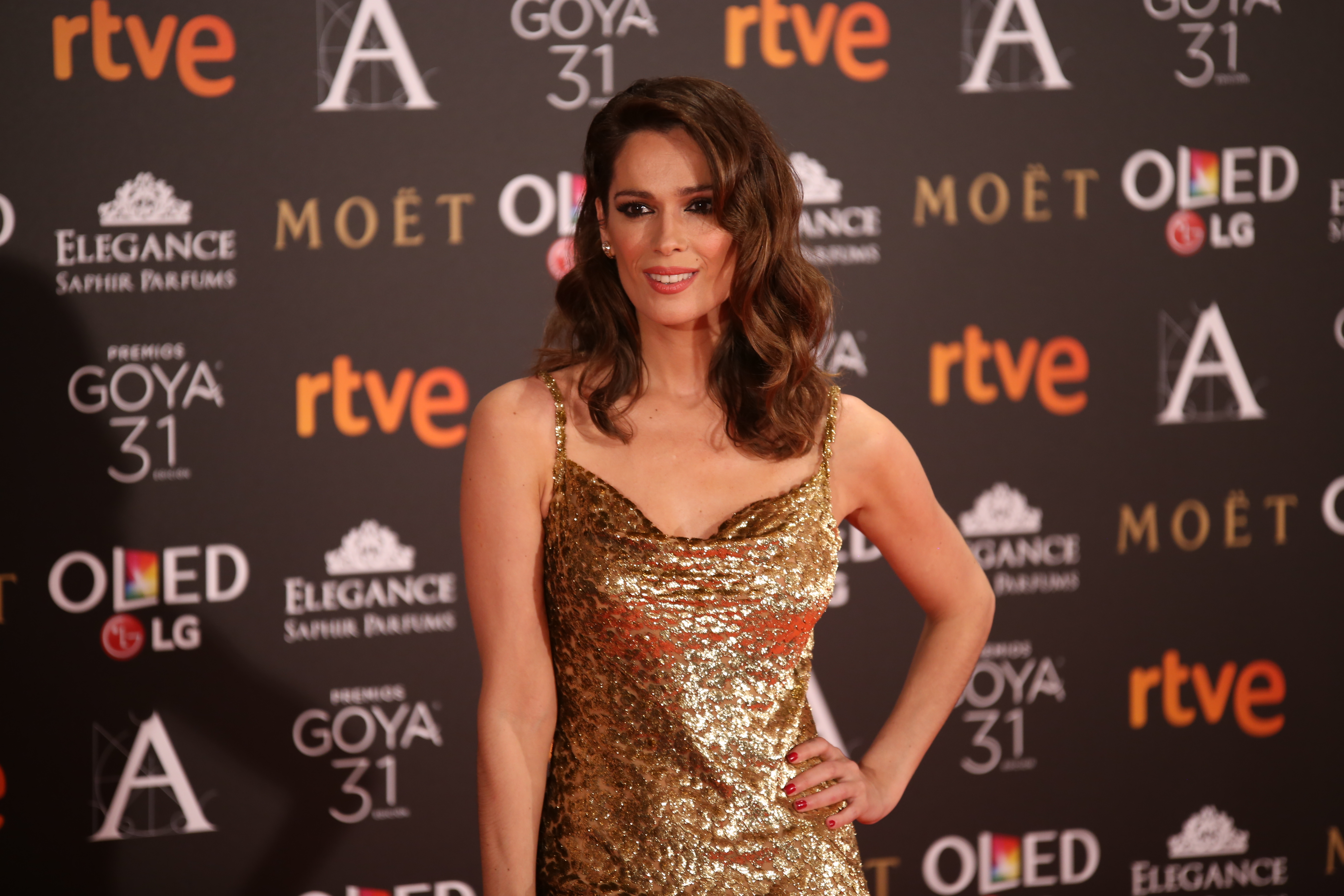 Premios Goya 2017